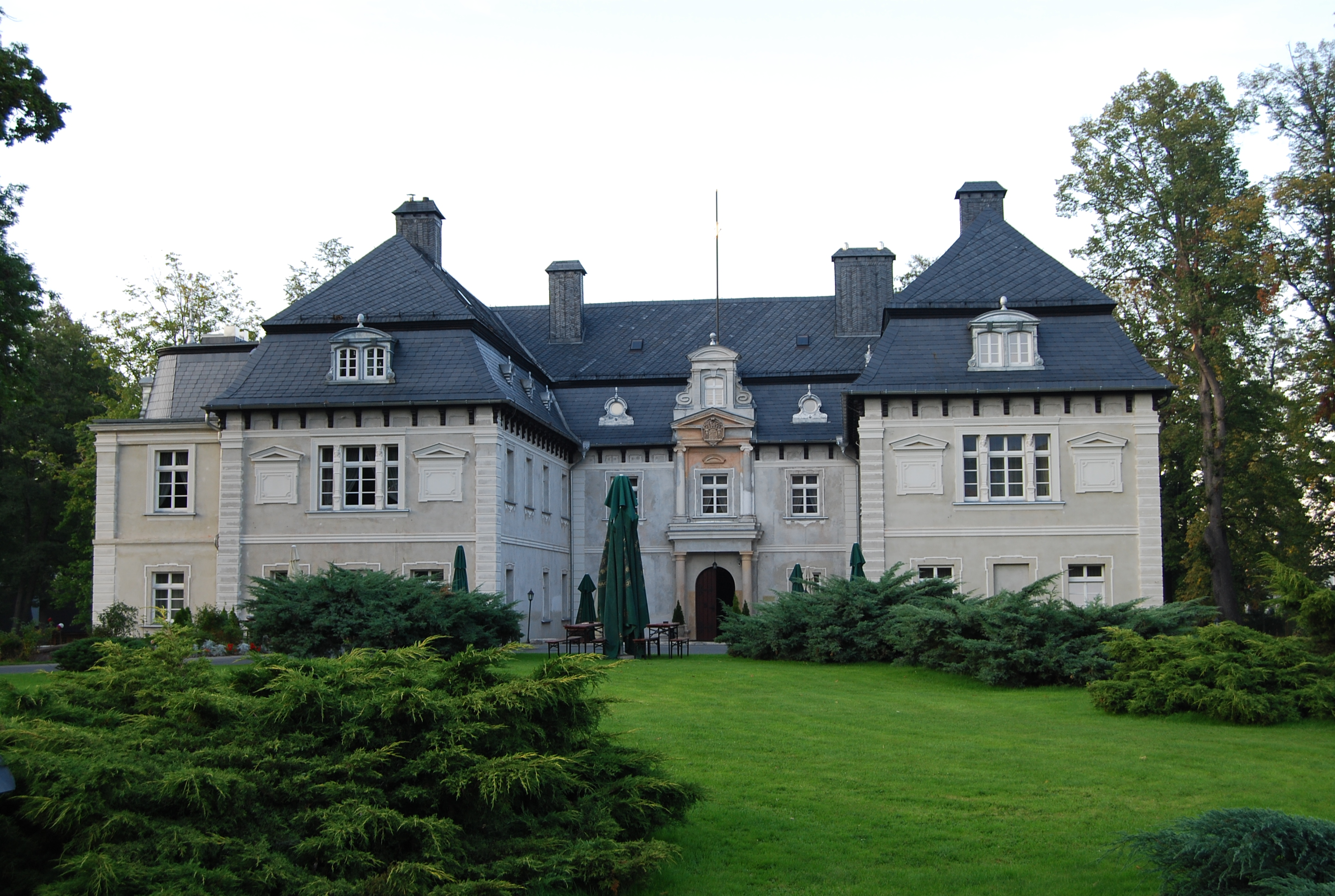 Pałac w Miłkowie, pow. jeleniogórski